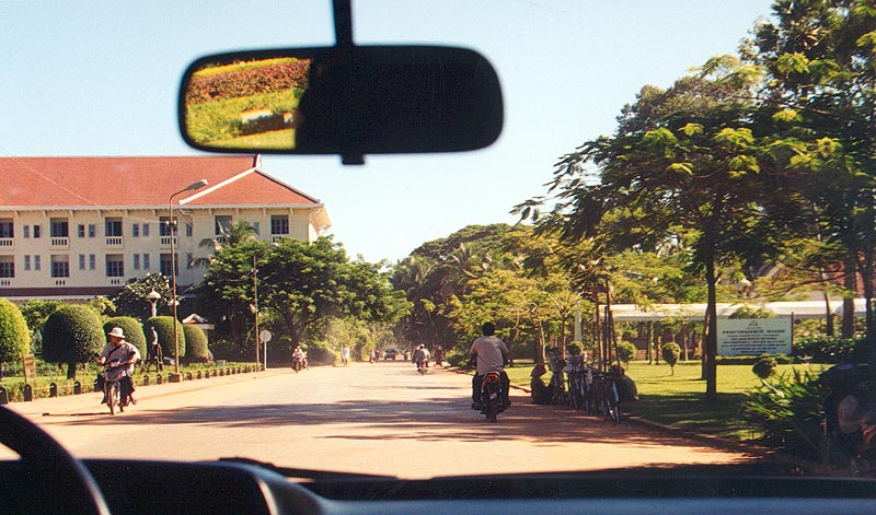 Siem Reap (Kambodscha), auf dem Weg zu den Tempeln von Angkor. Links im Bild das Grand Hotel D'Angkor, rechts der Zugang zum Angkor Village Theater wo täglich Vorführungen des klassischen kambodschanischen Tanzes ("Apsara-Tanz") stattfinden. Lizenz/Quelle Manfred Werner (Benutzer:Tsui), August 2001